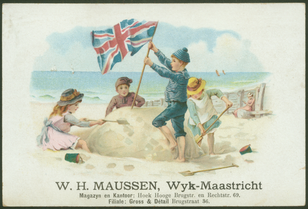 Visitekaart van de firma W.H. Maussen, winkel in o.a. garen & band, dames-modeartikelen, enz. gevestigd in Wyck-Maastricht. Het magazijn en kantoor lagen op de hoek Hoogbrugstraat-Rechtstraat 69 en het filiaal op het adres Wycker Brugstraat 36. Collectie RHCL Maastricht, nr. 2010-007.